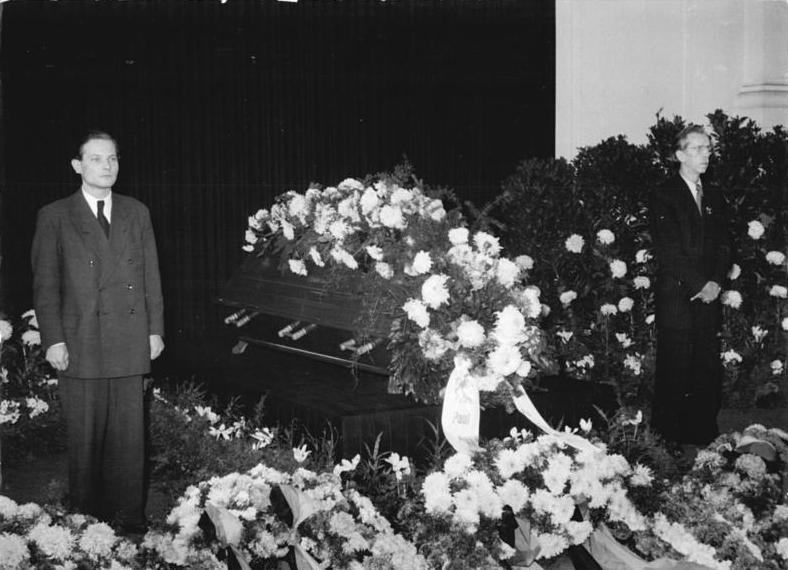 Berlin, Totenfeier Paul Rilla in AdK, Harych, Nagel Zentralbild Kruger 1 Motiv 10.11.1954 Paul Rilla in der Deutschen Akademie der Künste aufgebahrt Im Plenarsaal der Deutschen Akademie der Künste wurde der Literatur- und Theaterkritiker Paul Rilla aufgebahrt. UBz: Die Totenwache halten der Vizepräsident der Deutschen Akademie der Künste, Nationalpreisträger Otto Nagel (rechts) und Dr. Wolfgang Harych, Träger des Heinrich-Mann-Preises der Akademie (links). Abgebildete Personen: Nagel, Otto Prof.: Maler, Präsident der Akademie der Künste (AdK), Nationalpreisträger, Vaterländischer Verdienstorden (VVO) in Gold, DDR (GND 118586300)